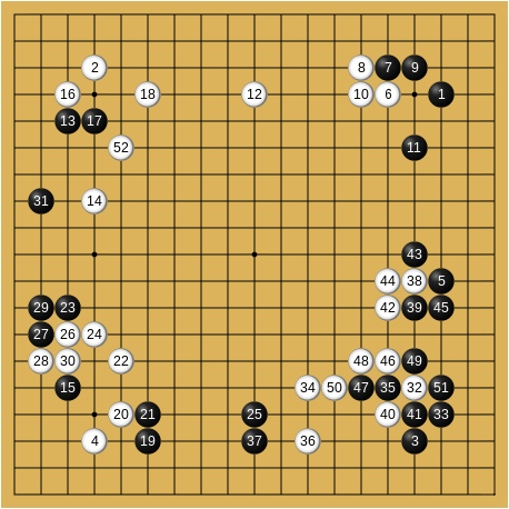 1959年7月3-4日 第14期本因坊戦挑戦手合七番勝負第3局 高川秀格-木谷實(先番) 1-52手目